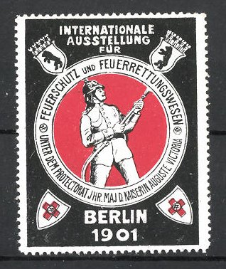 Reklamemarke Berlin, Int. Ausstellung für Feuerschutz & Feuerrettungswesen 1901